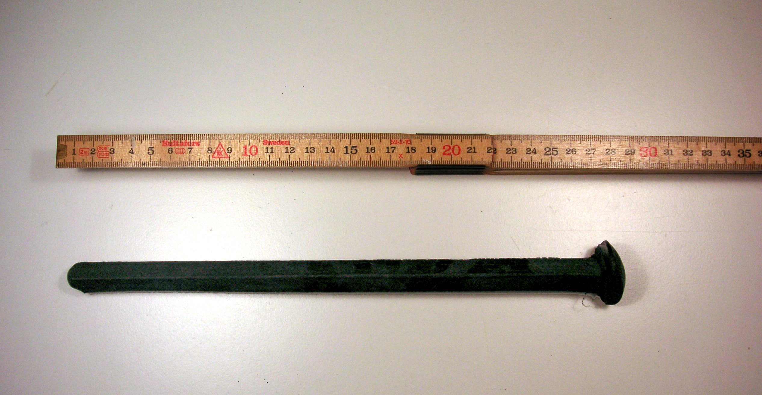 Smidd timmerspik (skeppsspik) till Ostindienfararen "Göteborg III"